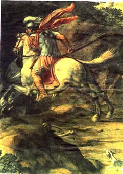 S. Crescenziano uccide il drago (Saint Crescentinus kills the dragon)